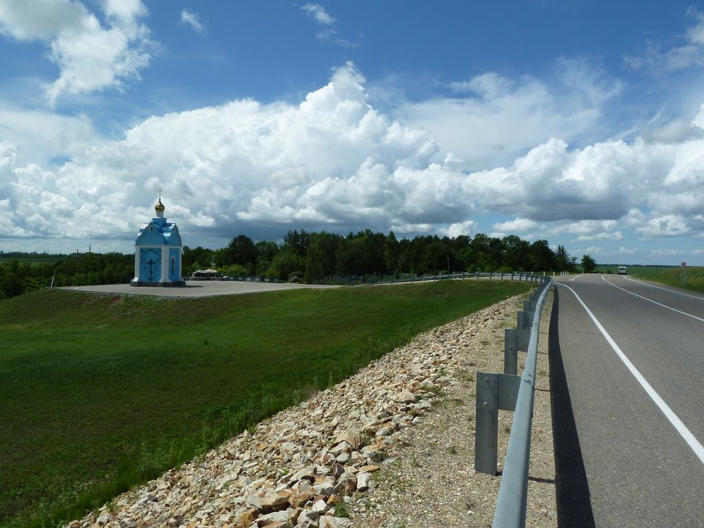 1536 км трассы Чита - Хабаровск